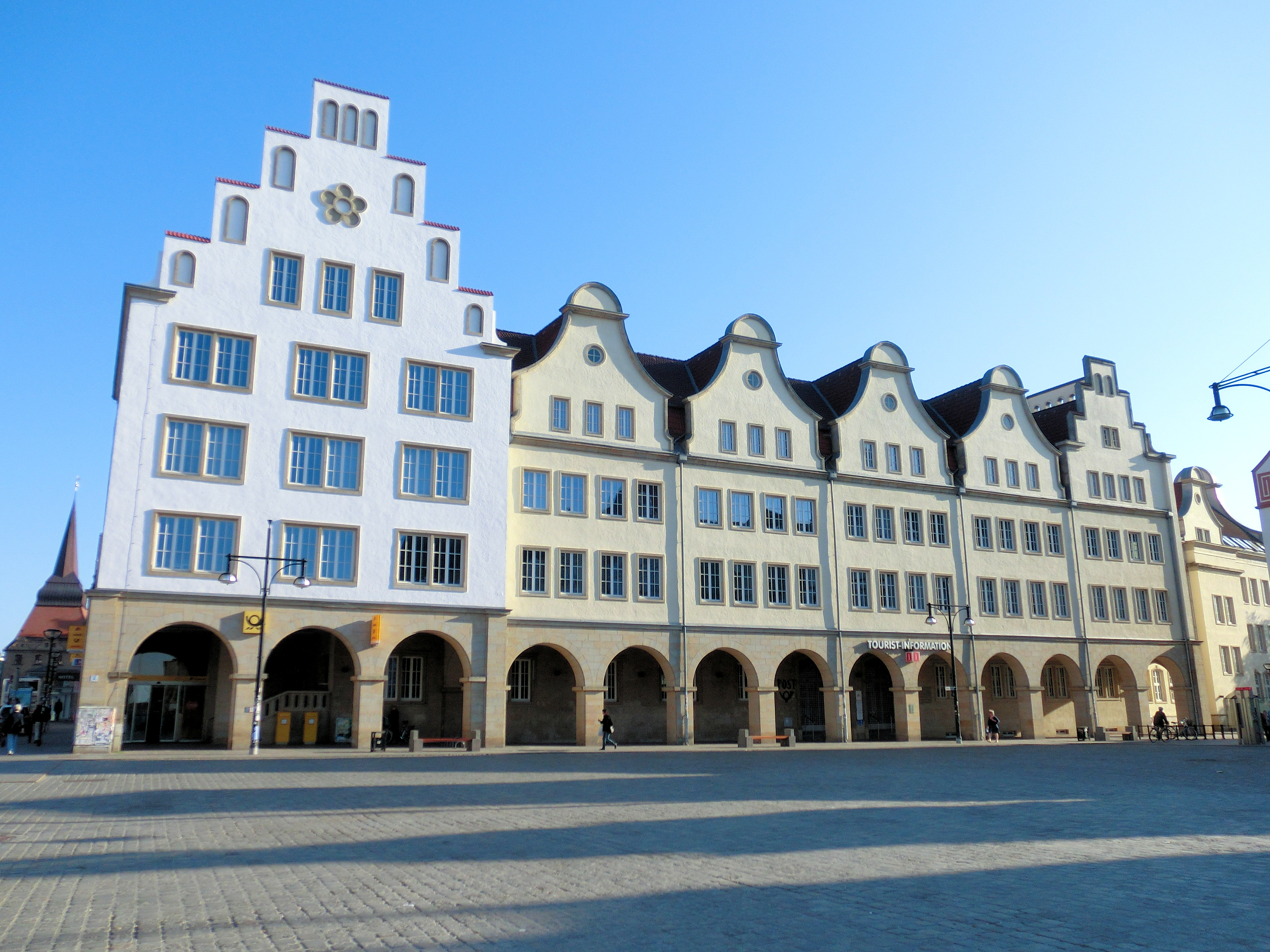 Rostock, Neuer Markt 3. Ehemalige Hauptpost von Rostock. Von April 2010 bis Januar 2016 Sitz des Landgerichts Rostock